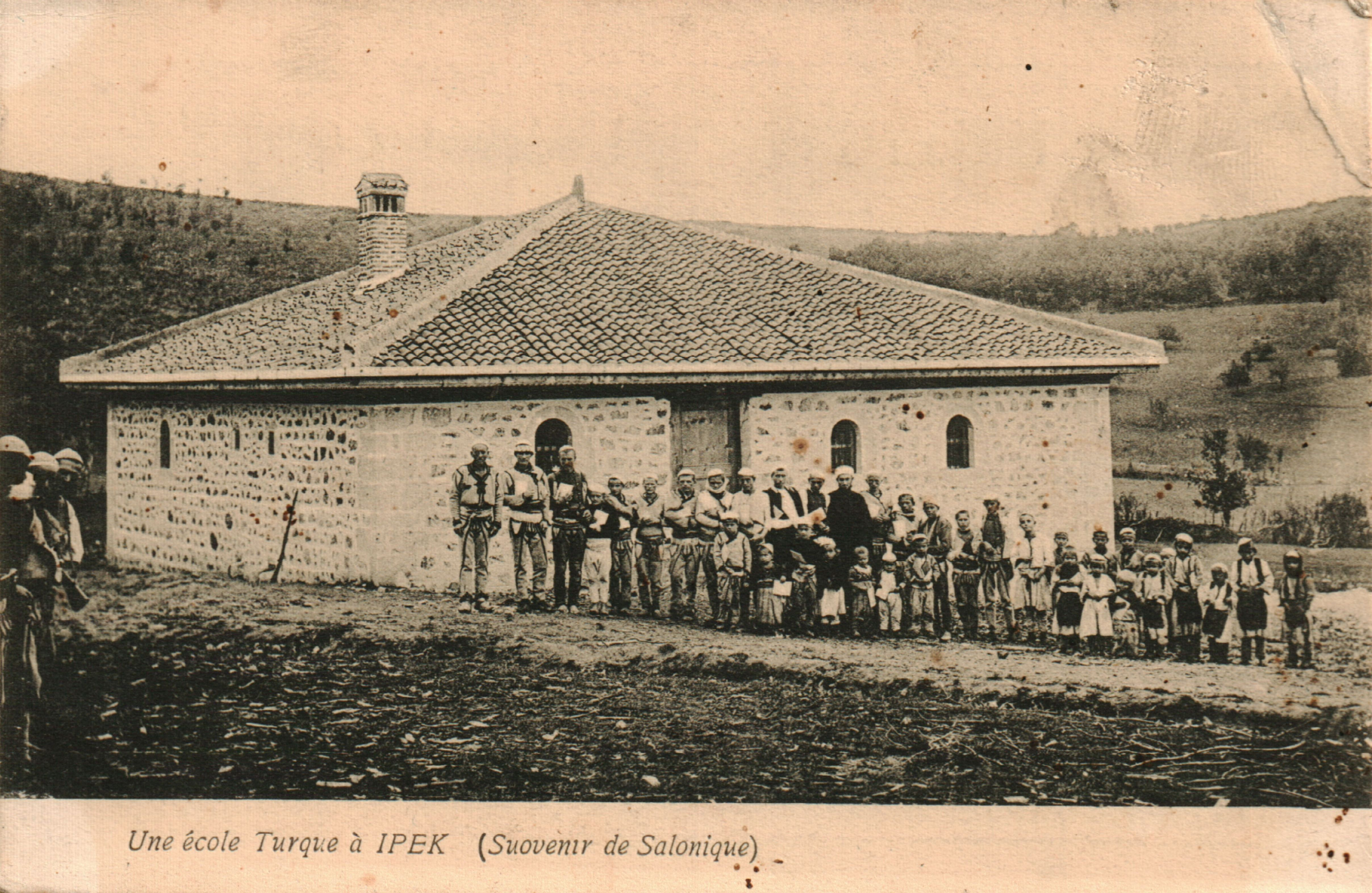 Снимки и пощенски картички на албанци.